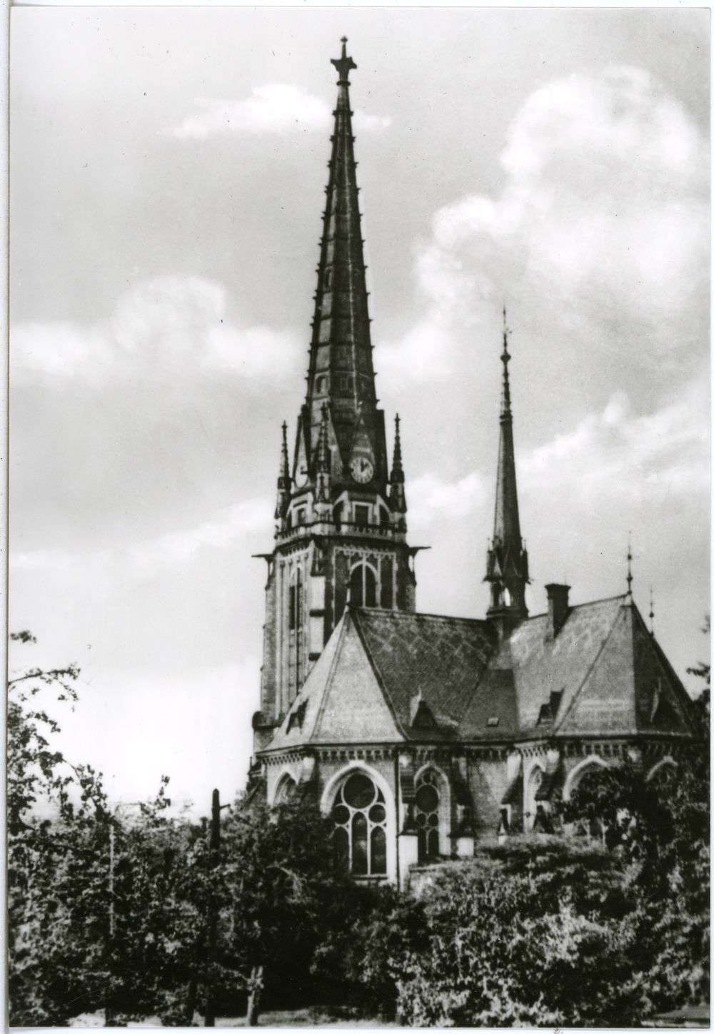 Meißen; Johanneskirche historisch This postcard is from publisher Brück & Sohn in Meißen ( postcard has a unique number 30612 and is available in a higher resolution at the publisher. This images was uploaded in a cooperation project between Wikipedians and the publisher.